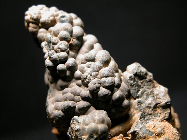 kryptomelan, pochodzenie Maroko; autor zdjęcia Piotr Menducki; 12.o8.2006r